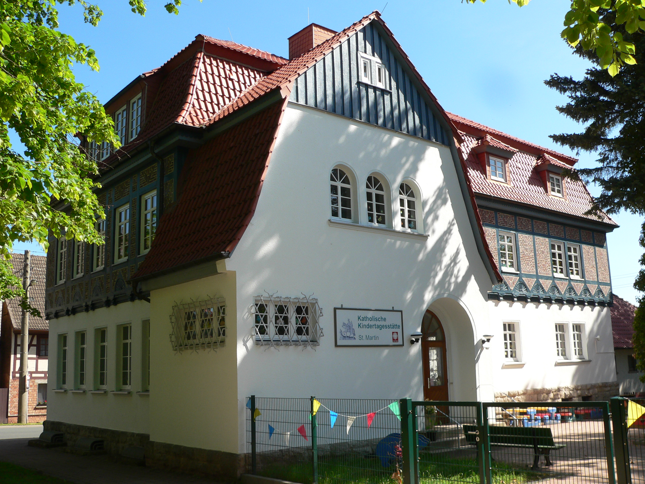 Buergermeisteramt und Kindergarten St.Martin